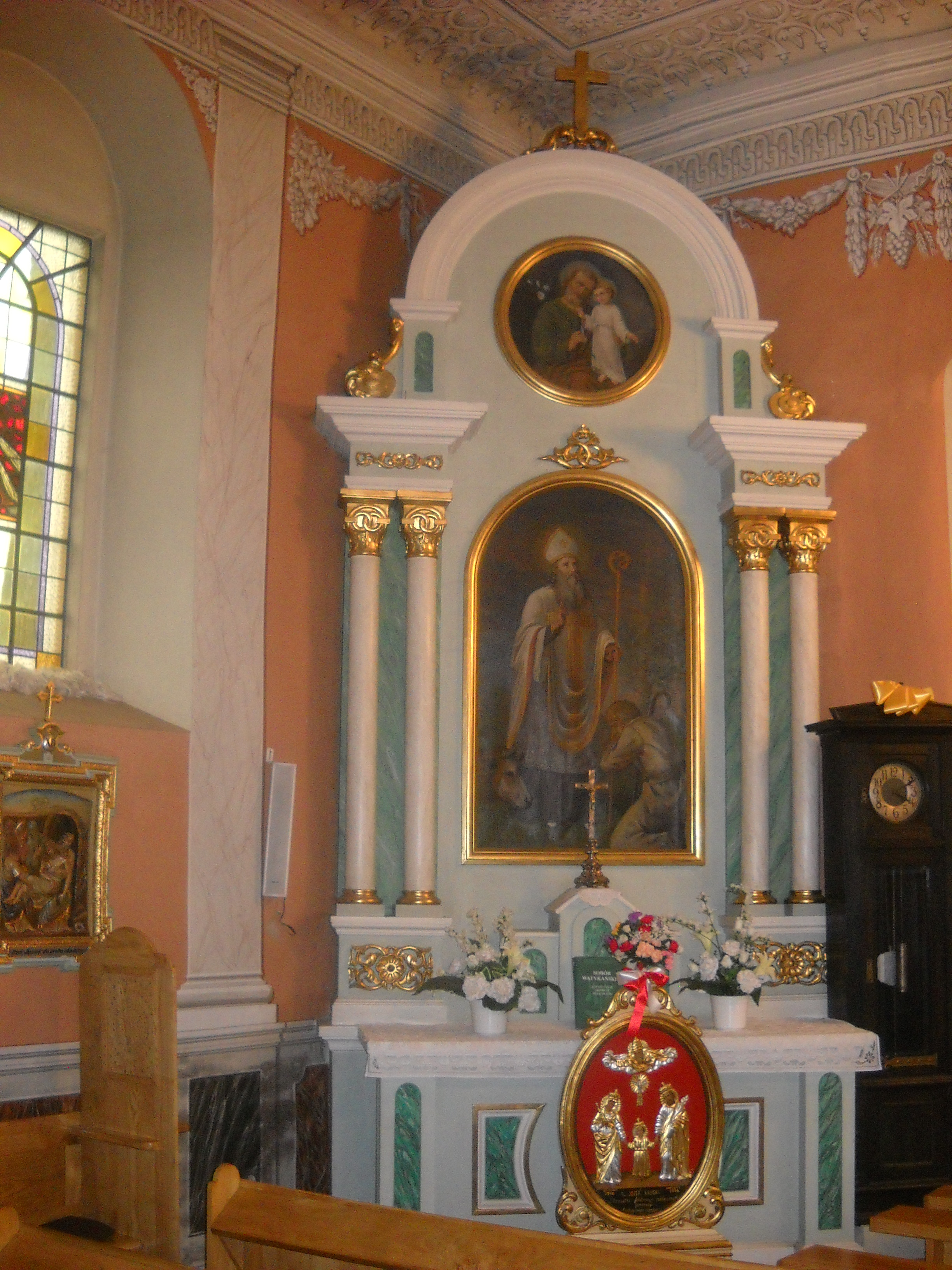 Wąsosze - rzymskokatolicki kościół parafialny pw. Wszystkich Świętych, ołtarz boczny św. Benona